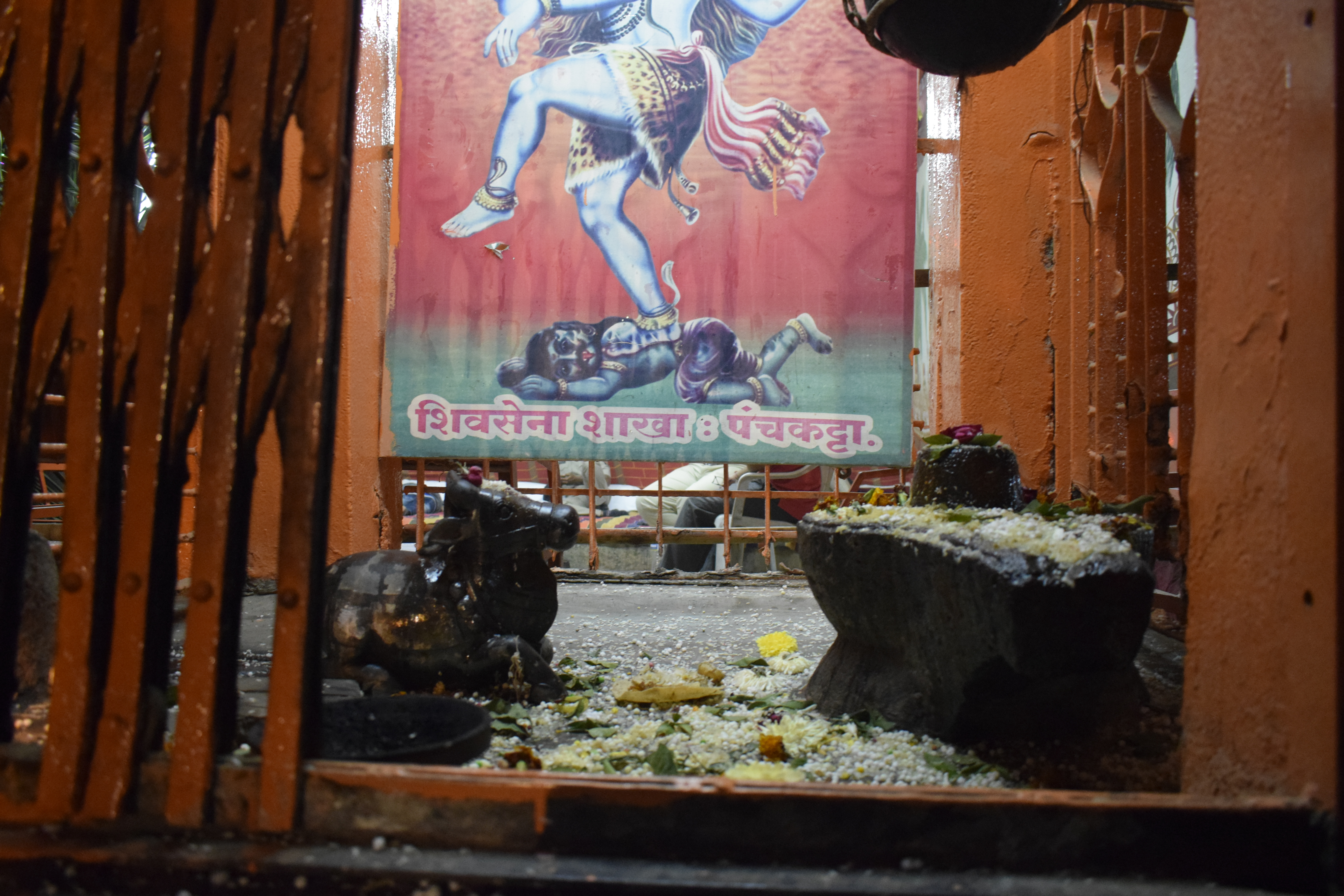 श्री सर्वेश्वर लिंग